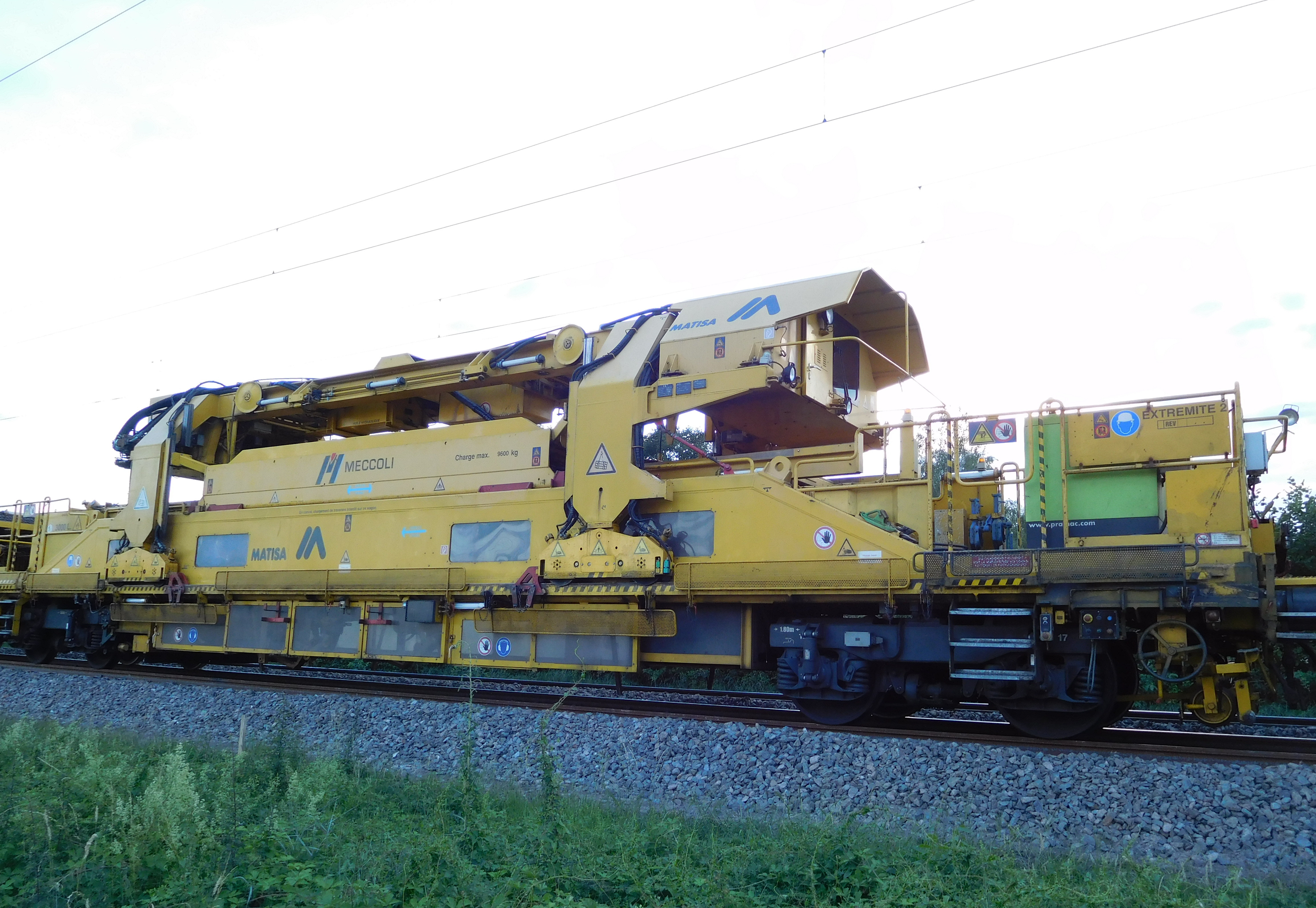 Portique Matisa P 20 TR, acheté par Meccoli, d'une capacité de 9 600 kg ou de 20 traverses. Alimente le train de coupe (train de construction) depuis les rames de wagons de traverses. Un portique, contrôlé par un opérateur en cabine, transporte des traverses sur le convoi en se déplaçant sur un chemin de roulement présent sur les wagons de transport de traverses et sur le train de construction.